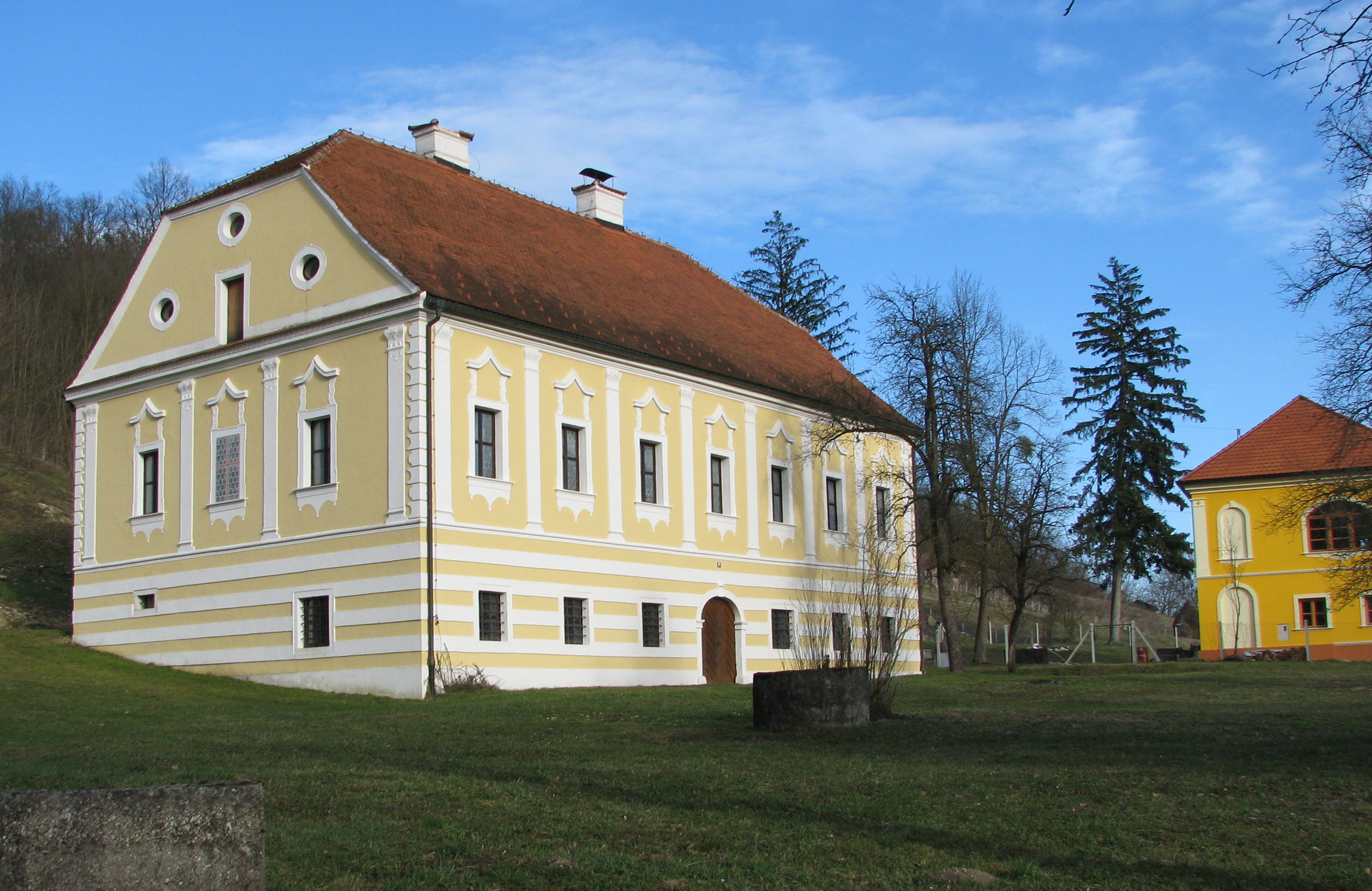 Kurija Razvor pokraj Kumrovca